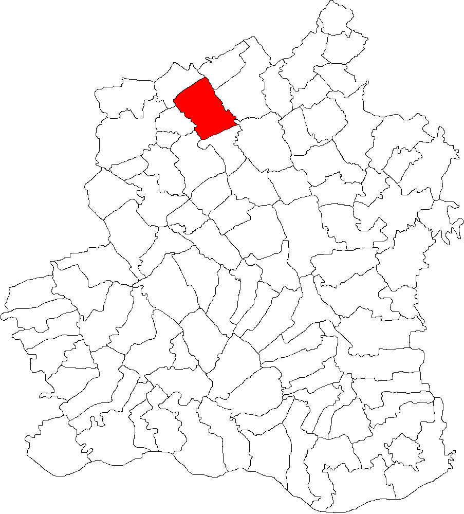 Categorie:Hărţi ale judeţului Teleorman